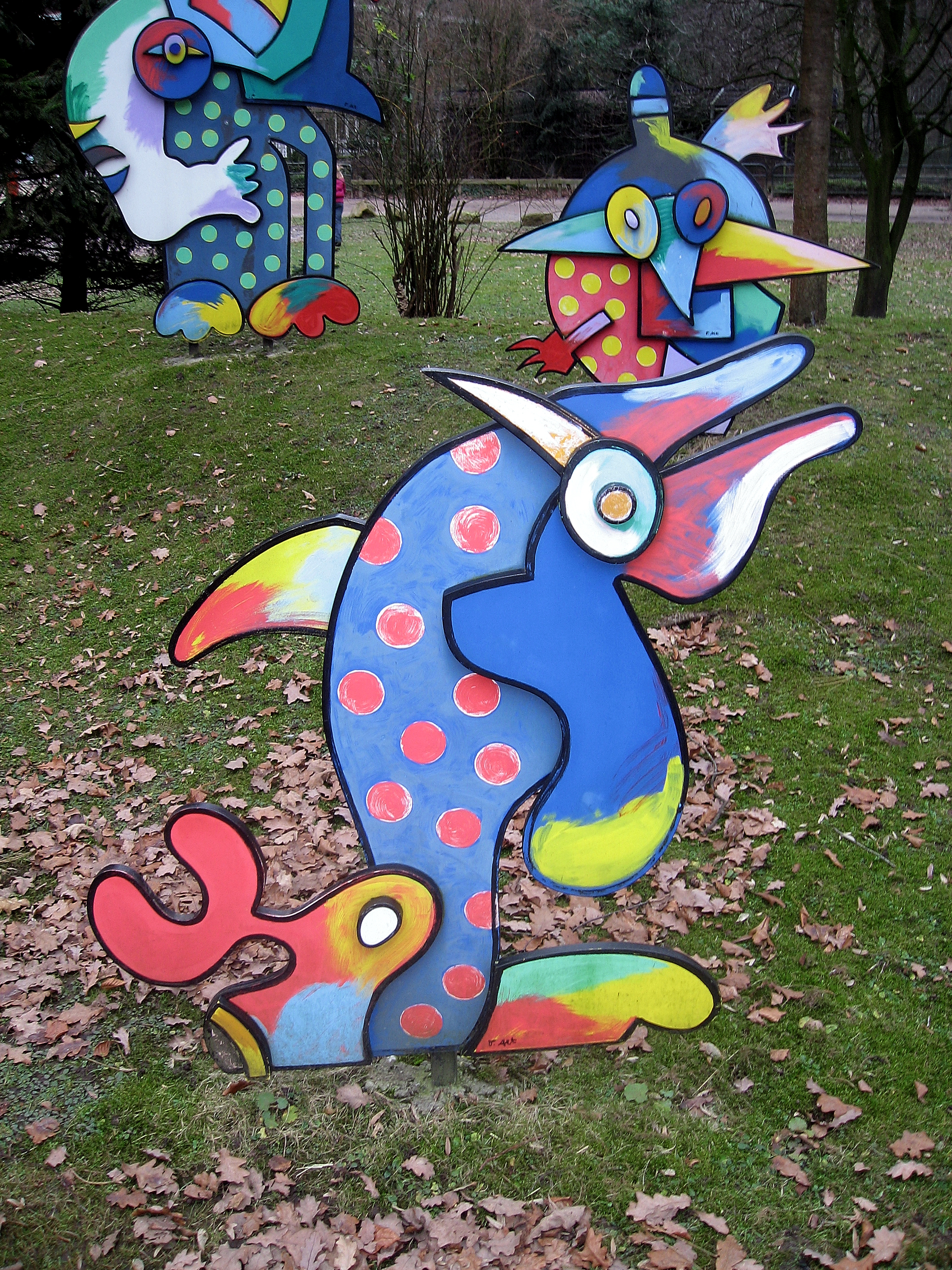 Otmar Alt, 10 Tierskulpturen im Zoo Münster, entstanden im Rahmen der Ausstellung “Animalia 85”, einer Präsentation von Tierplastiken des 20. Jahrhunderts im Allwetterzoo Münster, die Plastiken wurden 1991 von Alt überarbeitet